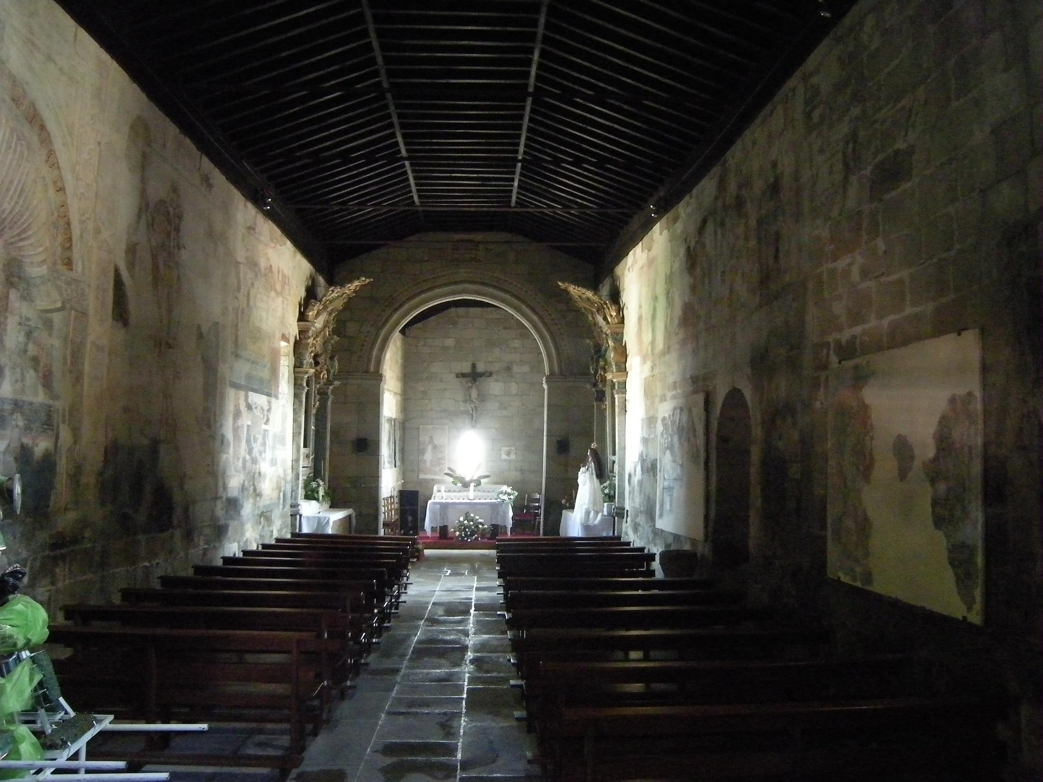 En el interior de la iglesia se encuentran unas pinturas murales, probablemente del siglo XVI.